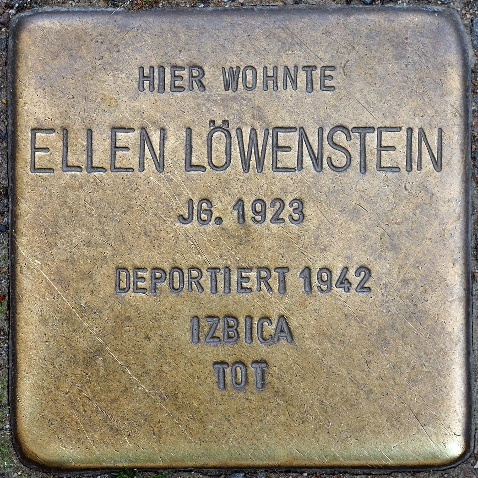 Stolpersteine MG: Löwenstein, Ellen